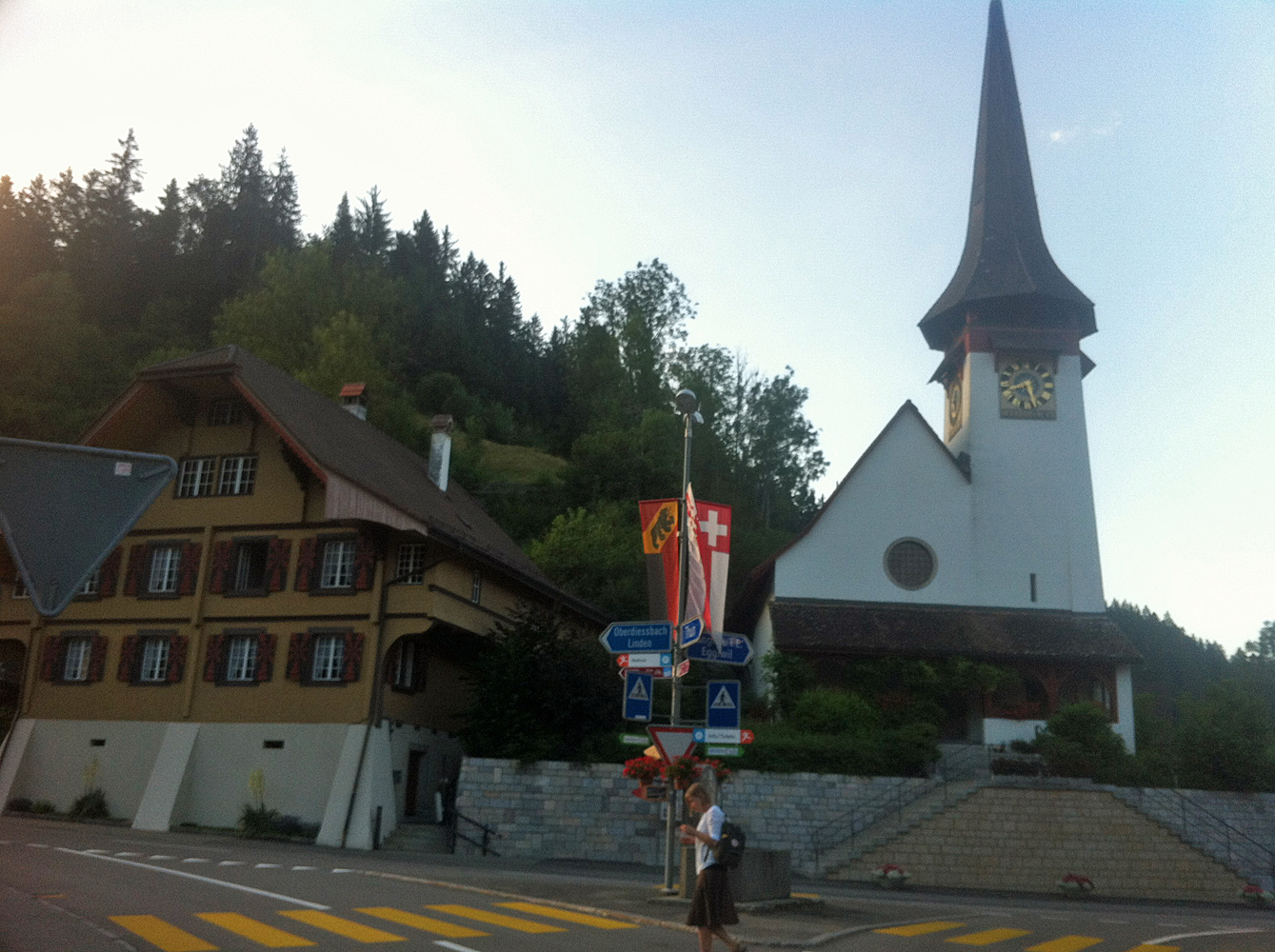 Kirche von Röthenbach im Emmental